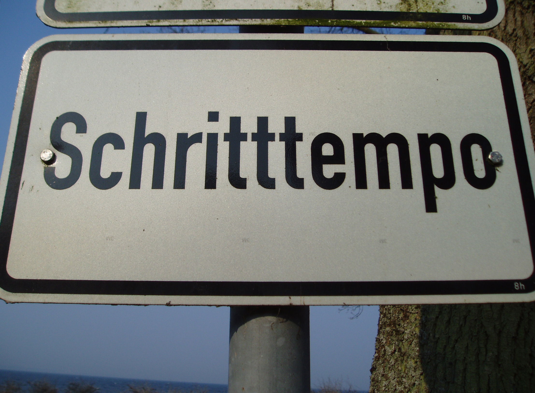 Neue deutsche Rechtschreibung (Dreifachkonsonant)